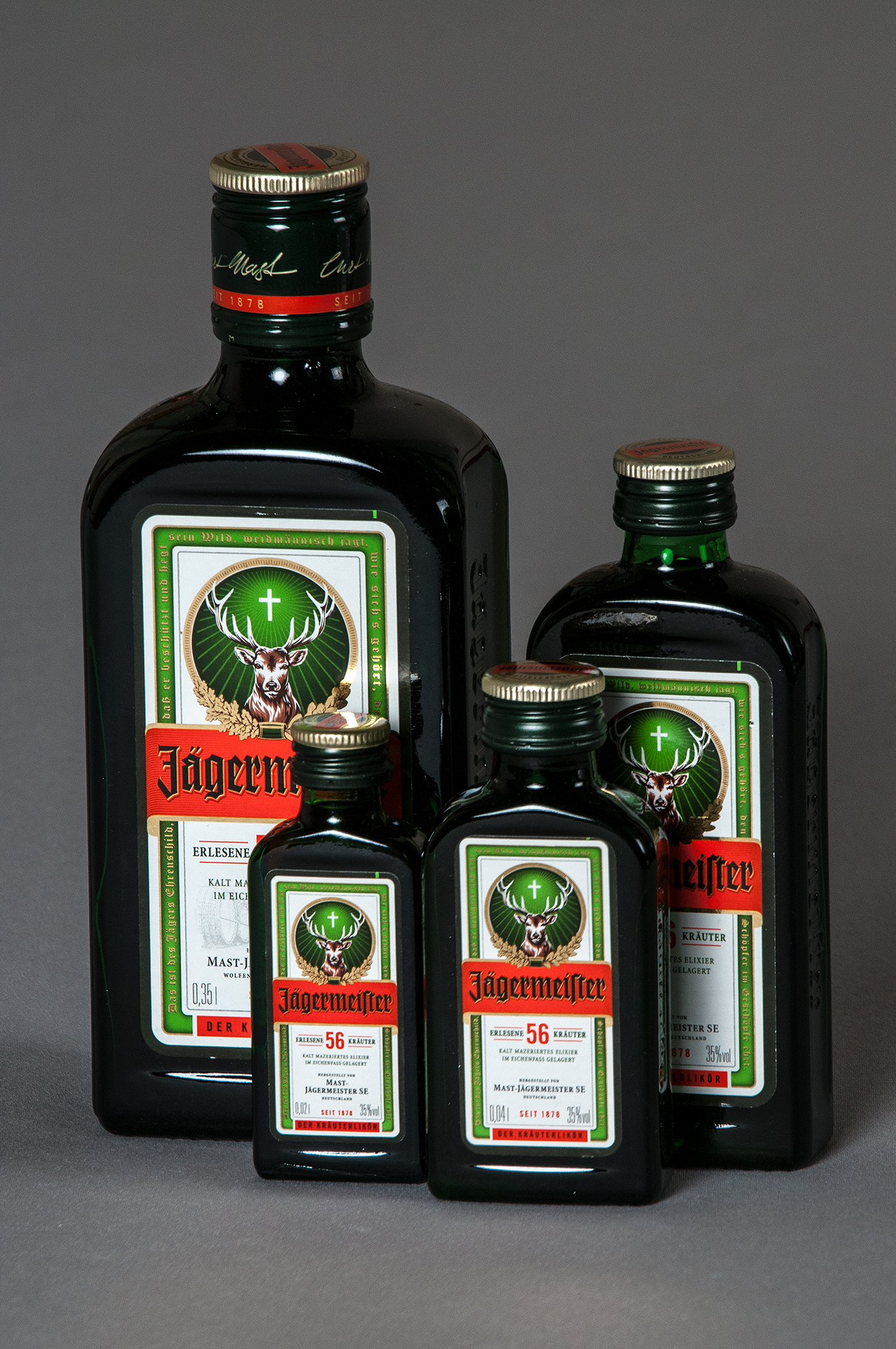 Jägermeister, Flaschen mit 0,35 / 0,10 / 0,04 / 0,02 Liter Inhalt